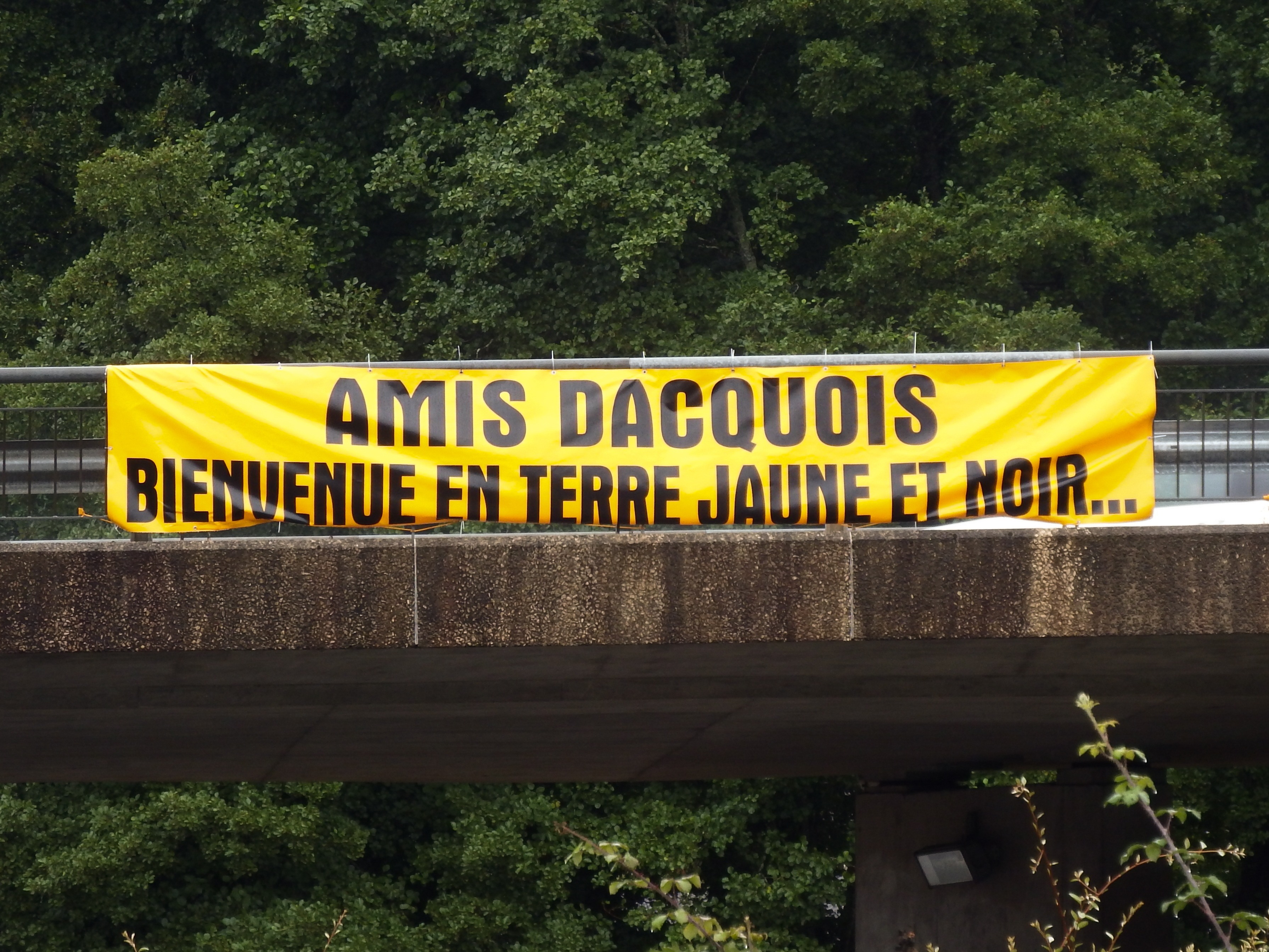 Banderole installée par des supporteurs du Stade montois, sur le pont du rond-point de Coumassotte (D824), dans le cadre du match entre le Stade montois et l'US Dax joué le 2 September 2016.